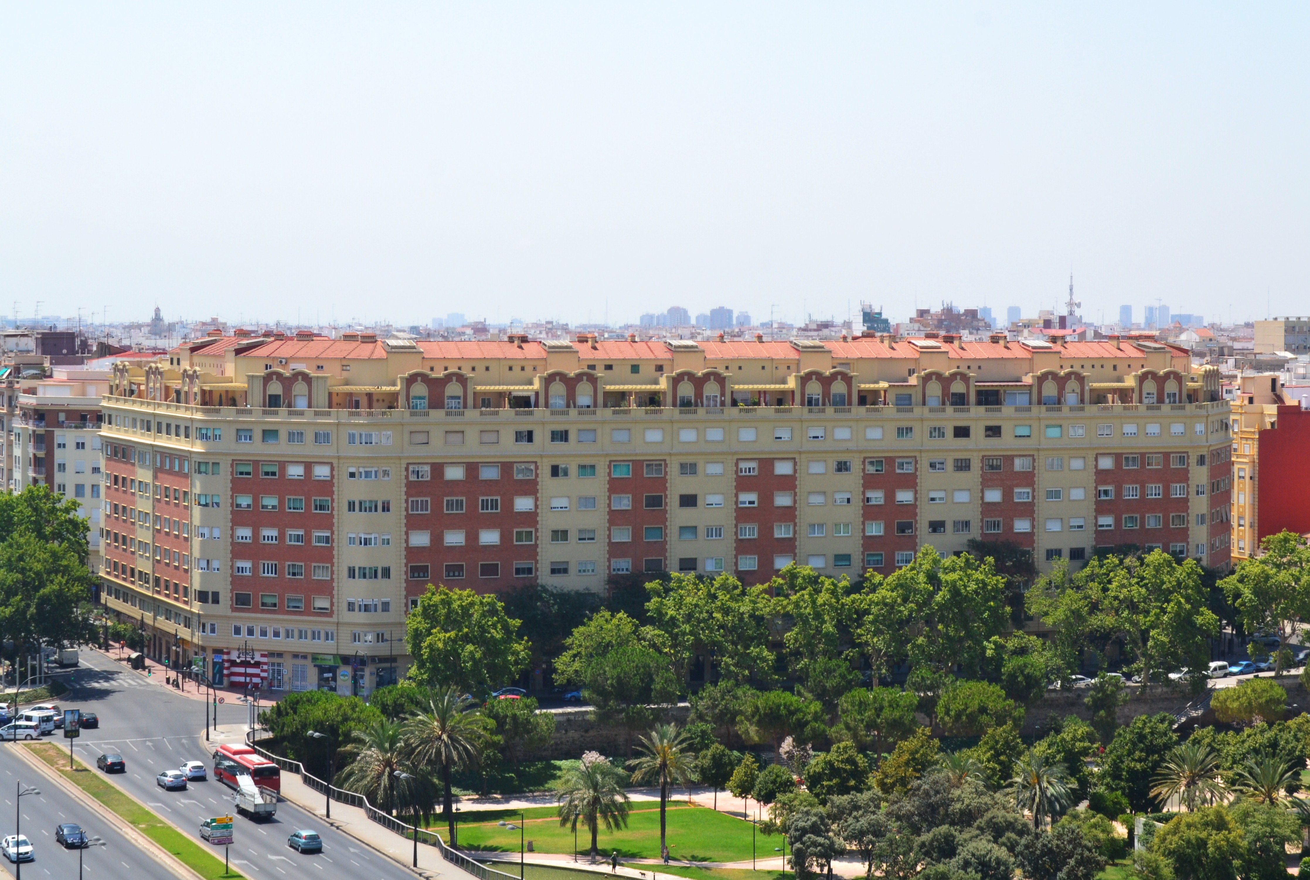 Vista del Grup Residencial d'Agents Comercials Secció D o finca Ferca, València.